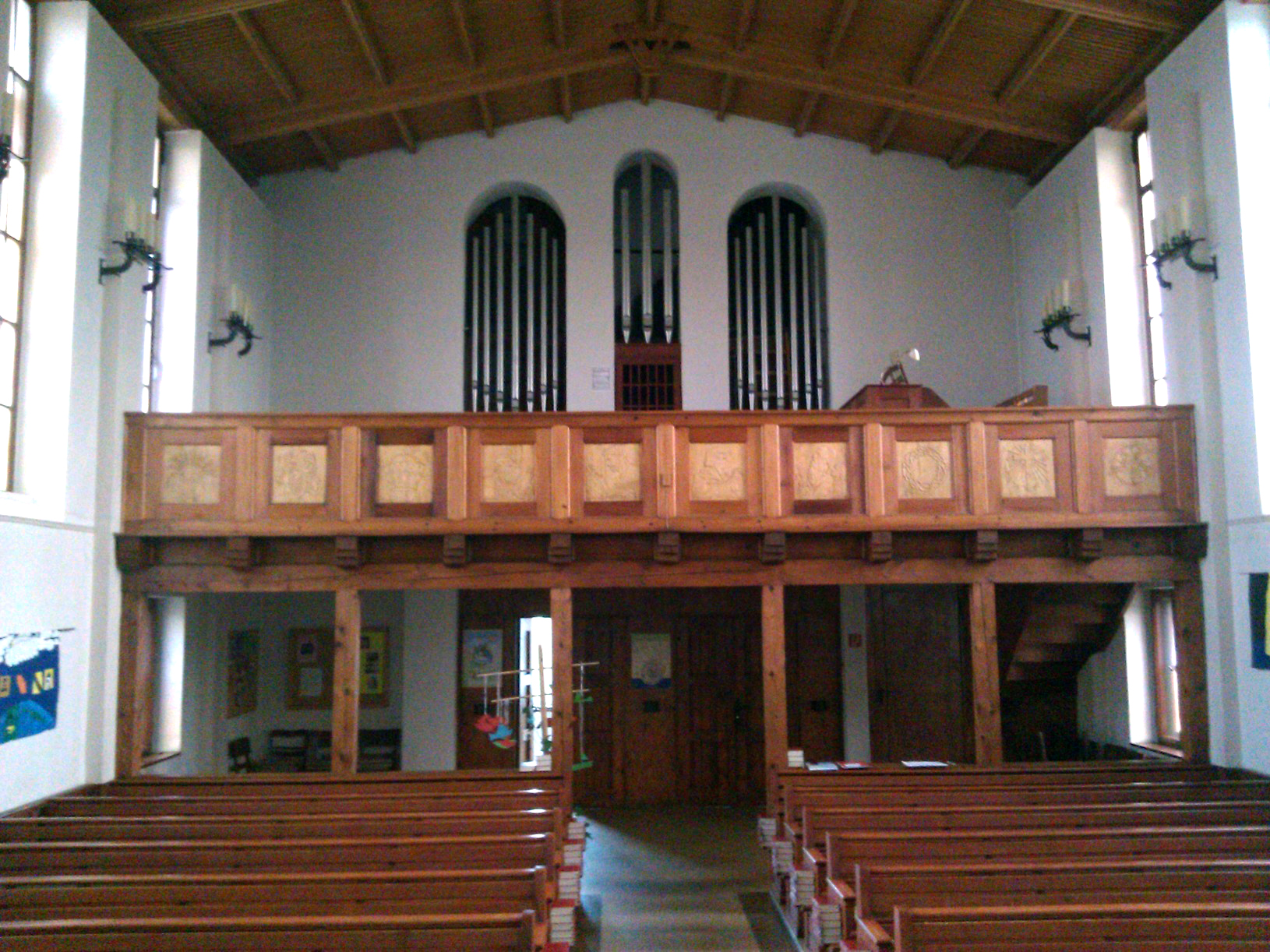 Blaue Kirche in Stetten am kalten Markt, Empore mit Orgel